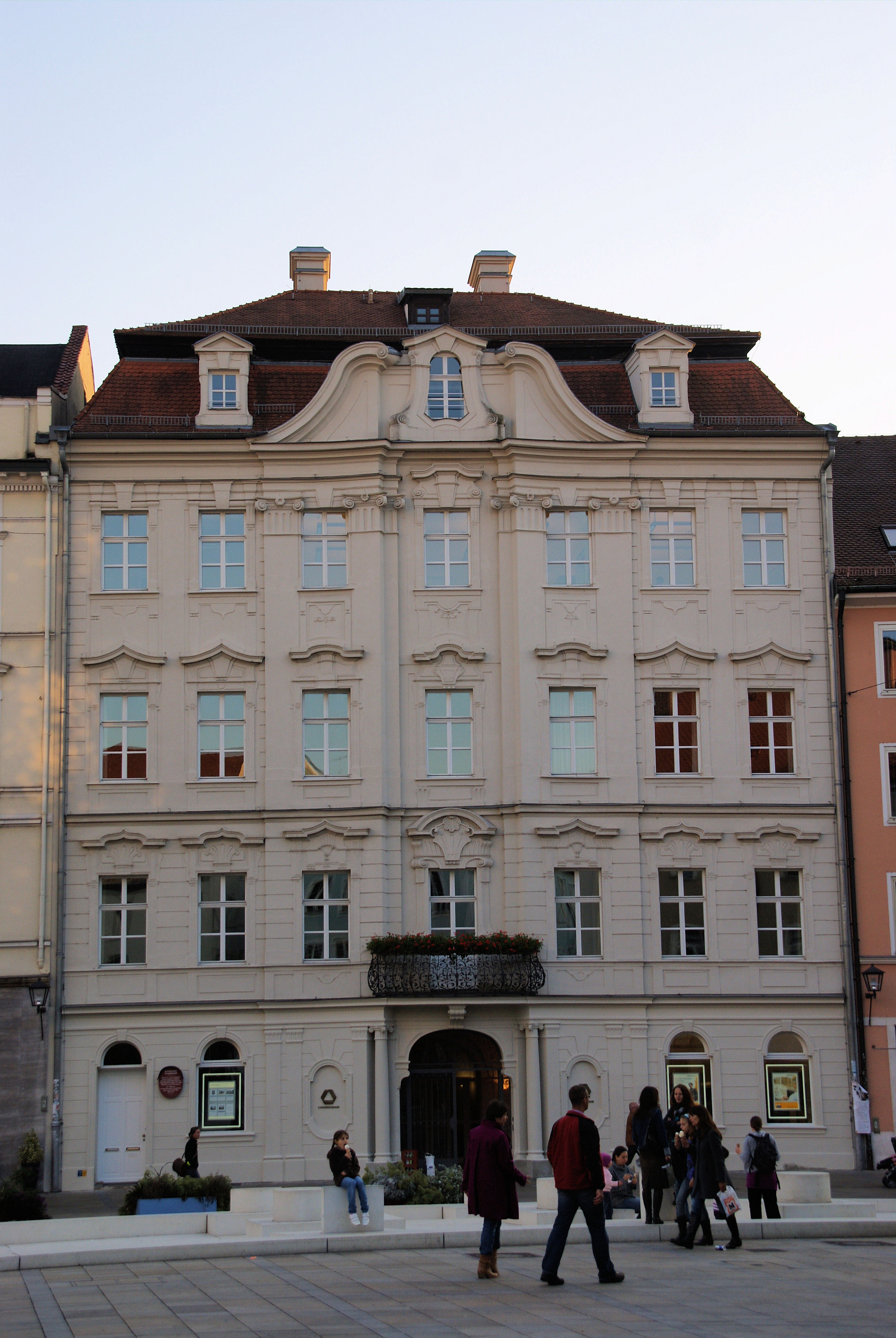 Löschenkohl-Palais in Regensburg, ehemalige kursächsische Gesandtschaft